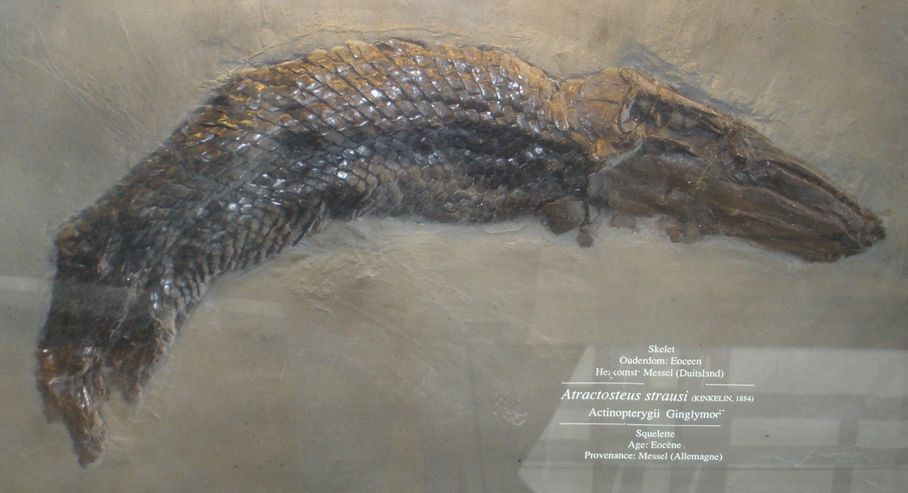 Fossil of Atractosteus, an extinct fish Took the photo at Musee d'Histoire Naturelle, Brussels